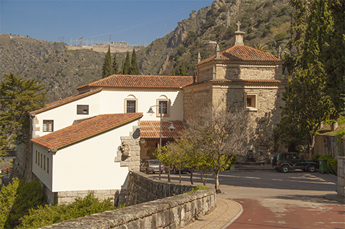 Convento de Santa Marina, en el poblado de La Verde, Aldeadávila de la Ribera, Castilla y León, España